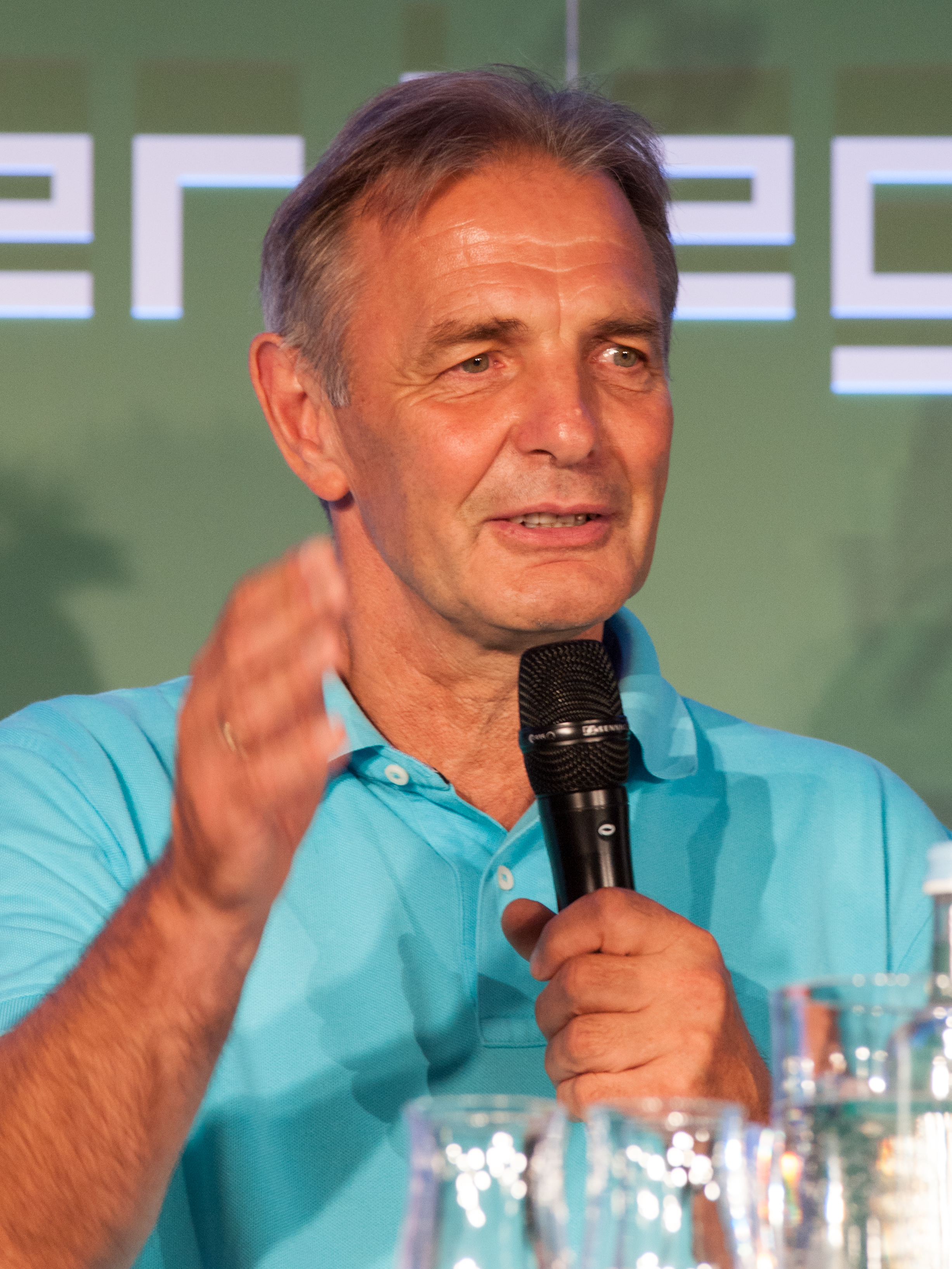 Pressekonferenz zum 10. Tag der Legenden im Hotel Le Royal Méridien